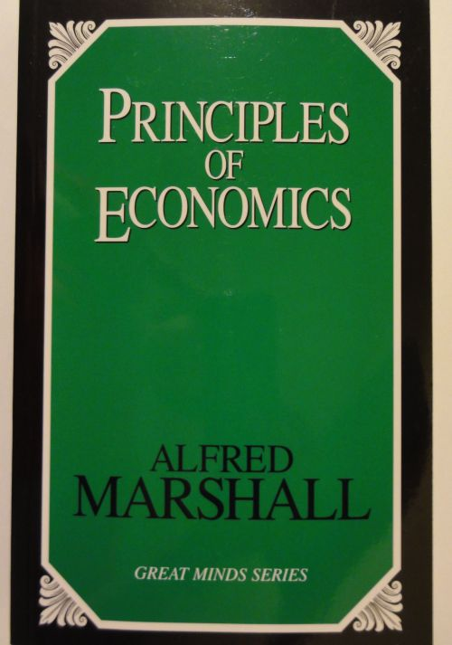 Alfred Marshall - Zásady ekonomie (1890), Great Minds Series, Prometheus books 1997